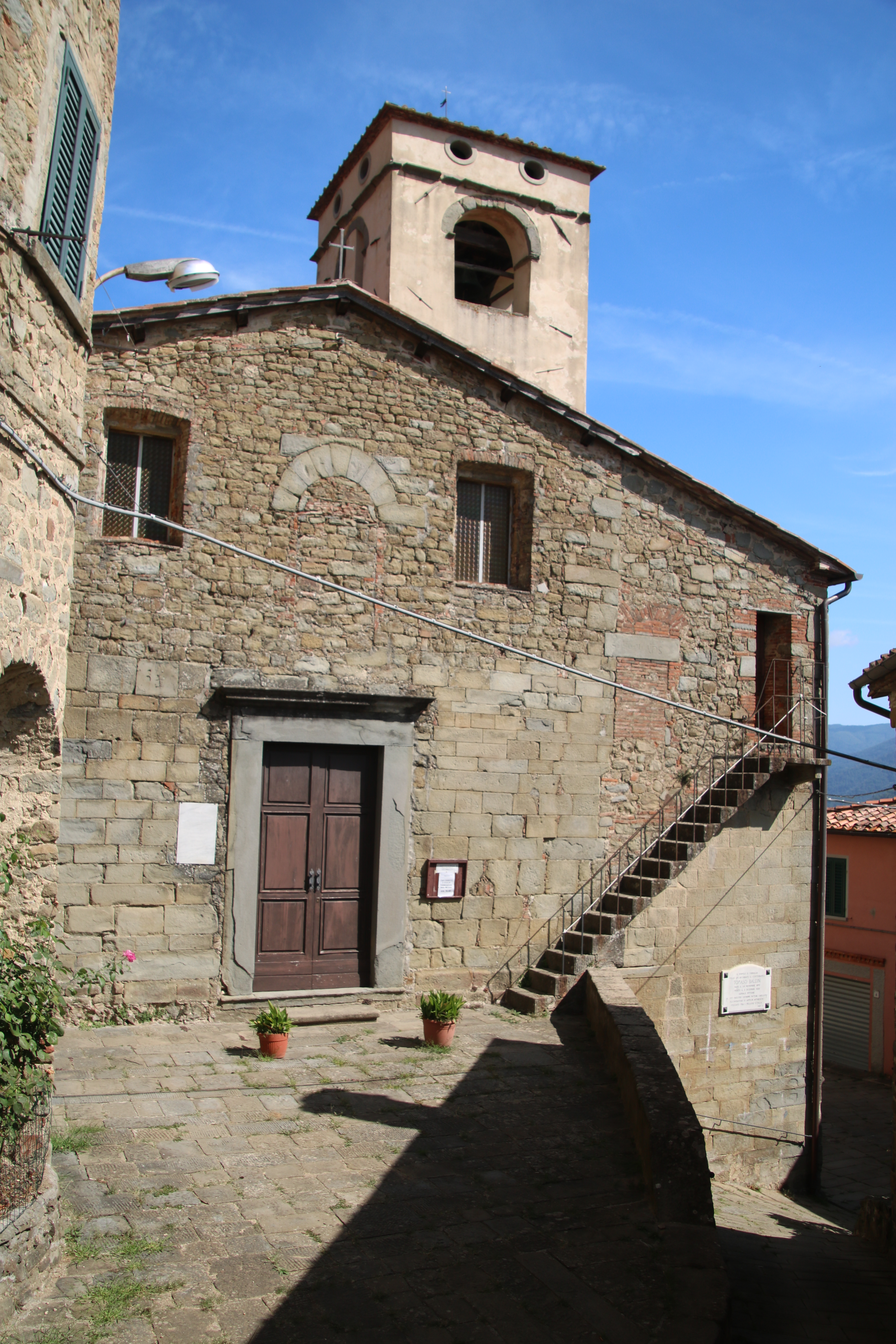 Fibbialla (Pescia) This is a photo of a monument which is part of cultural heritage of Italy.